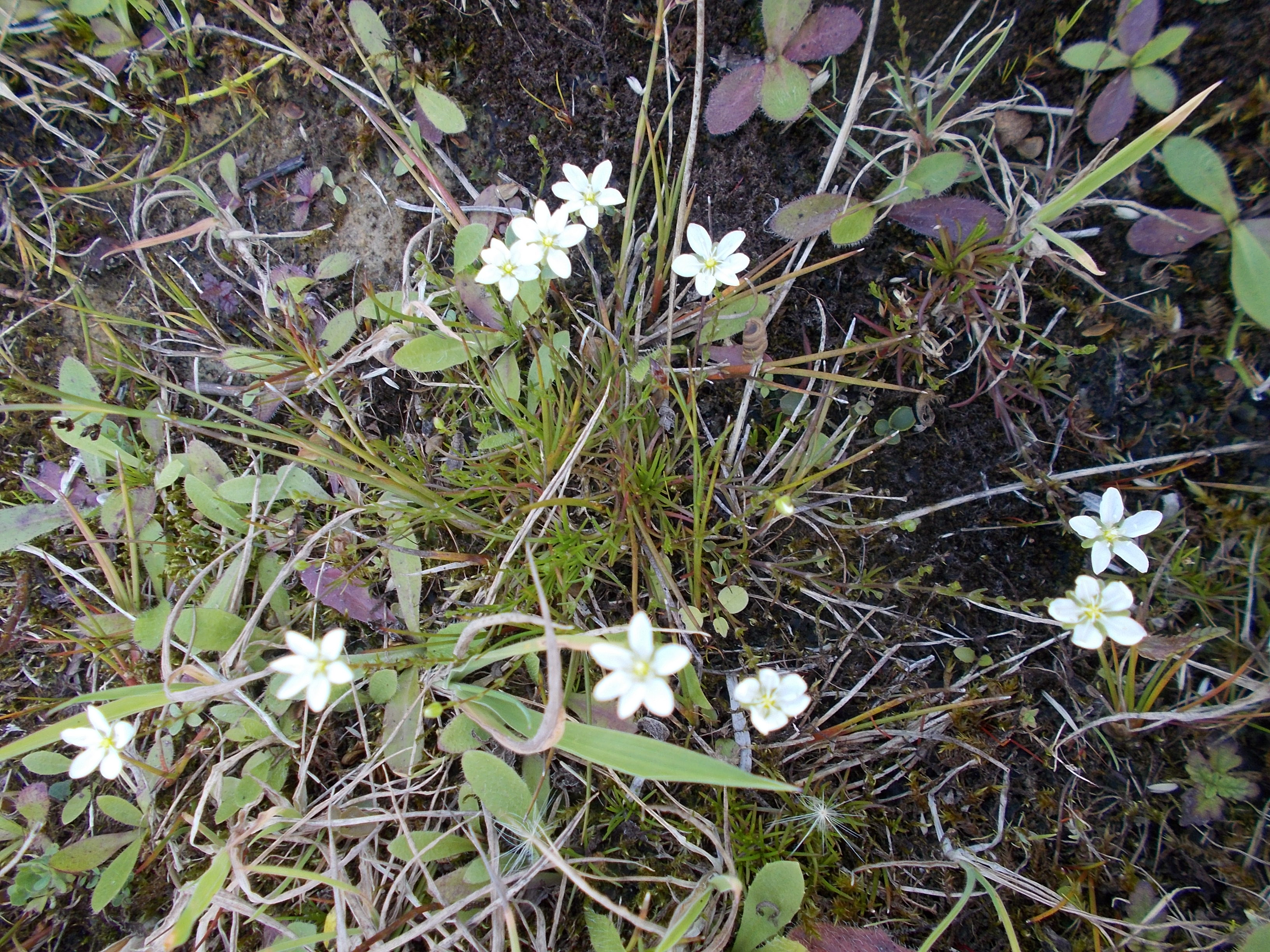 Sierlijke vetmuur of krielparnassia, (Sagina nodosa) in juli 2015 gefotografeerd in de Baarlermars bij Deventer. Rode lijst soort.